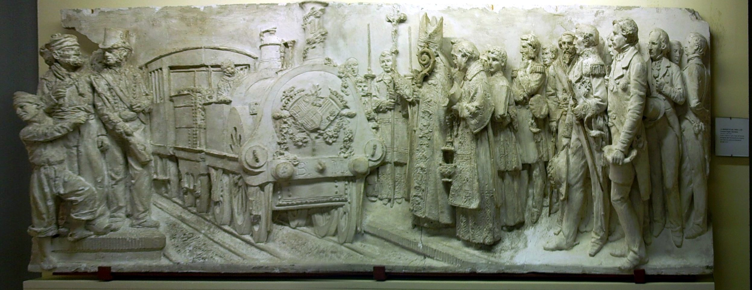 La Benedicció del tren, (segle XIX), Francesc Pagès i Serratosa (Barcelona, 1852-1899) relleu original en guix, base del bronze "Allegoria del Ferrocarril" de la façana del Palau de Justícia de Barcelona. Es conserva al Museu Comarcal de Mataró, número de catàleg MCMM 5415. Fotografia editada amb GIMP, a partir de dues imatges, la de la dreta ha estat deformada amb l'eina perspectiva, per coincidir amb la de l'esquerra. Finalment s'ha deformat novament amb la mateixa eina, per eliminar la perspectiva